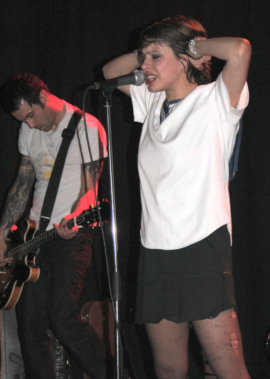 Jana Pallaske und Spitting Off Tall Buildings live im Heidelberger Karlstorbahnhof